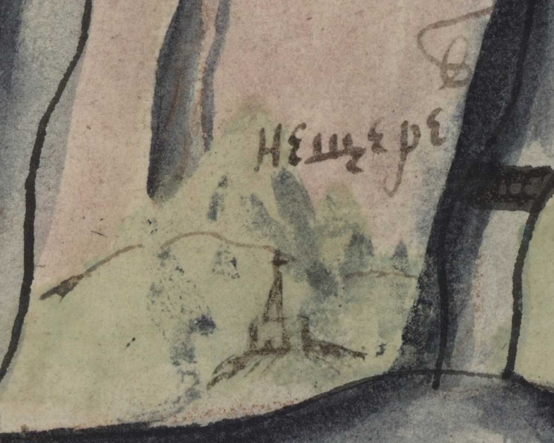 Фрагмент карти Київської губернії. XVIII століття. РГАДА, ф. 192, оп. 1, Киевская губ., № 5.